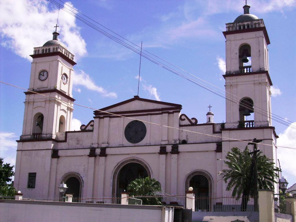 Catedral de San Andres Tuxtla, Veracruz